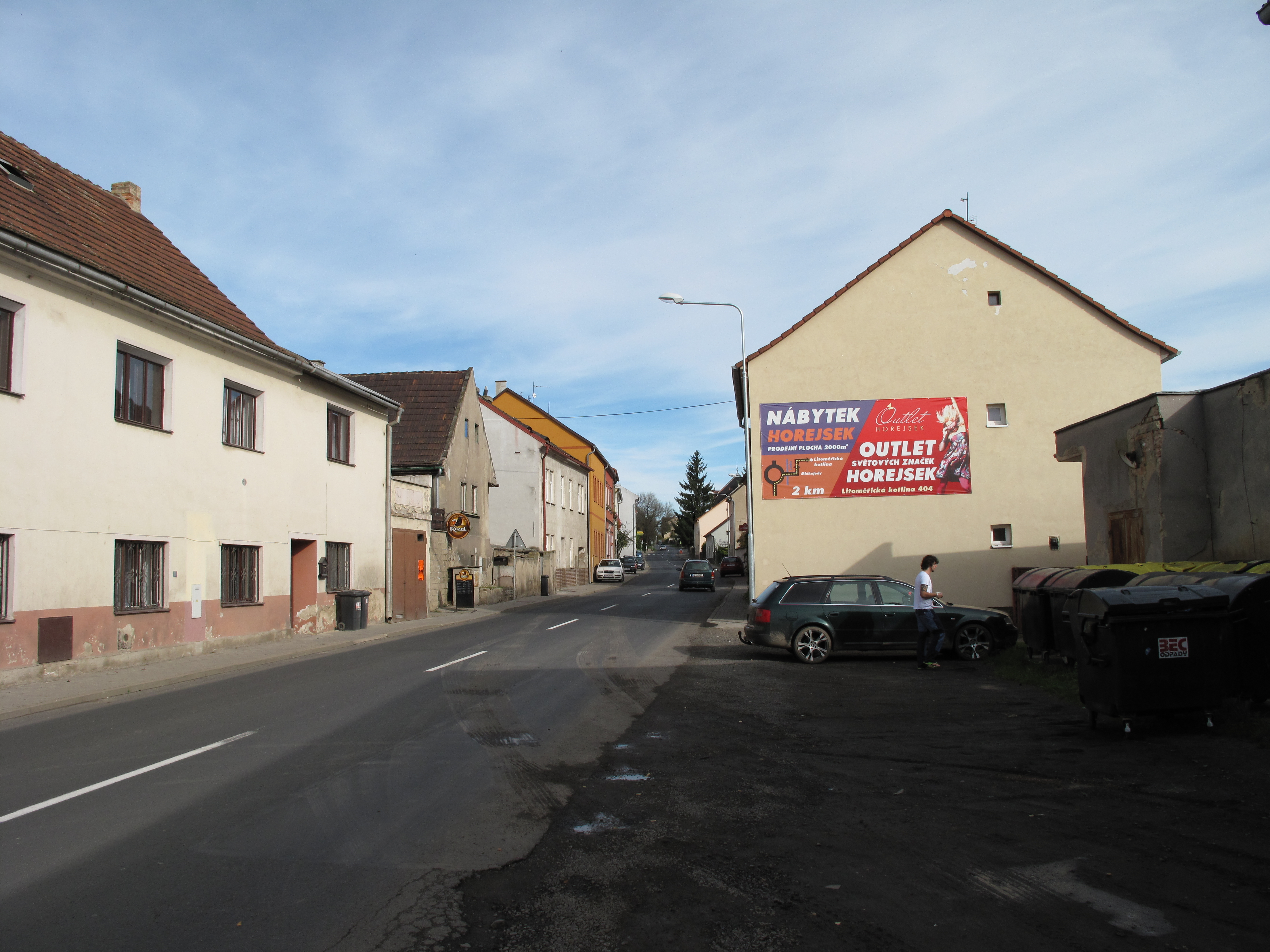 Domy u silnice v Žalhosticích. Okres Litoměřice, Česká republika.